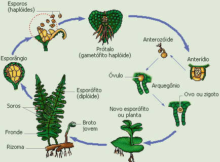 Imagem representando a reprodução das samambaias